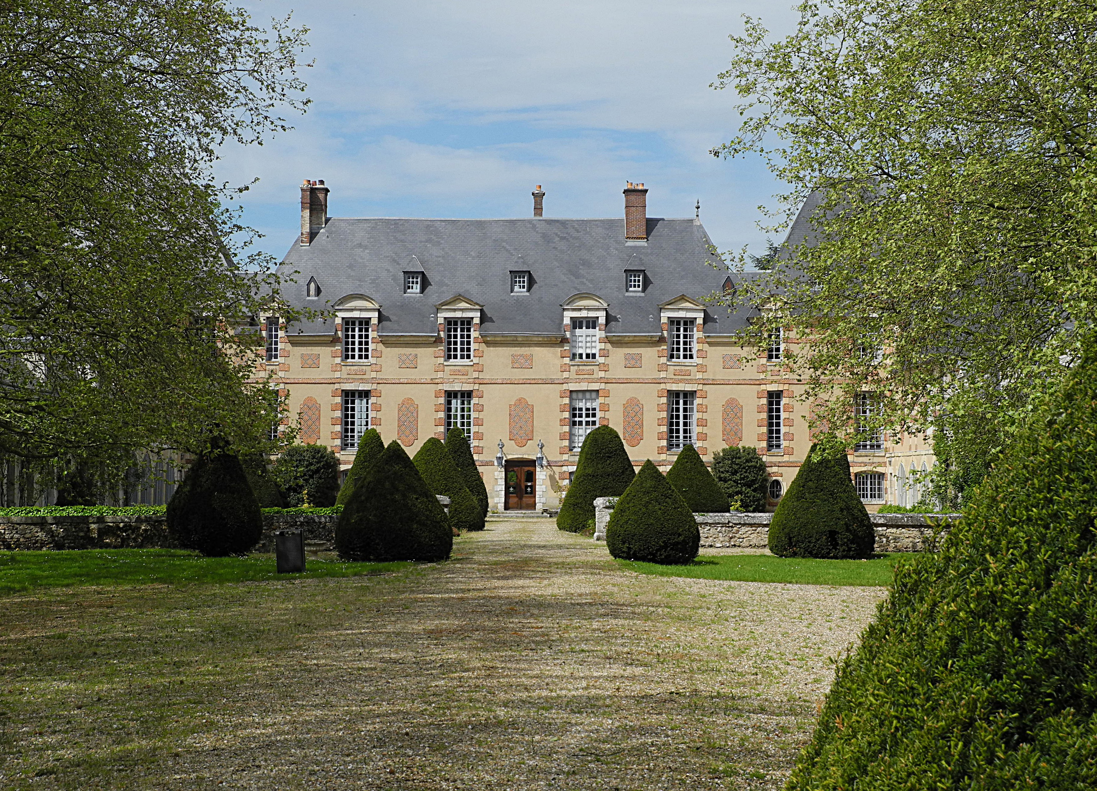 Château de Brécourt (Eure)